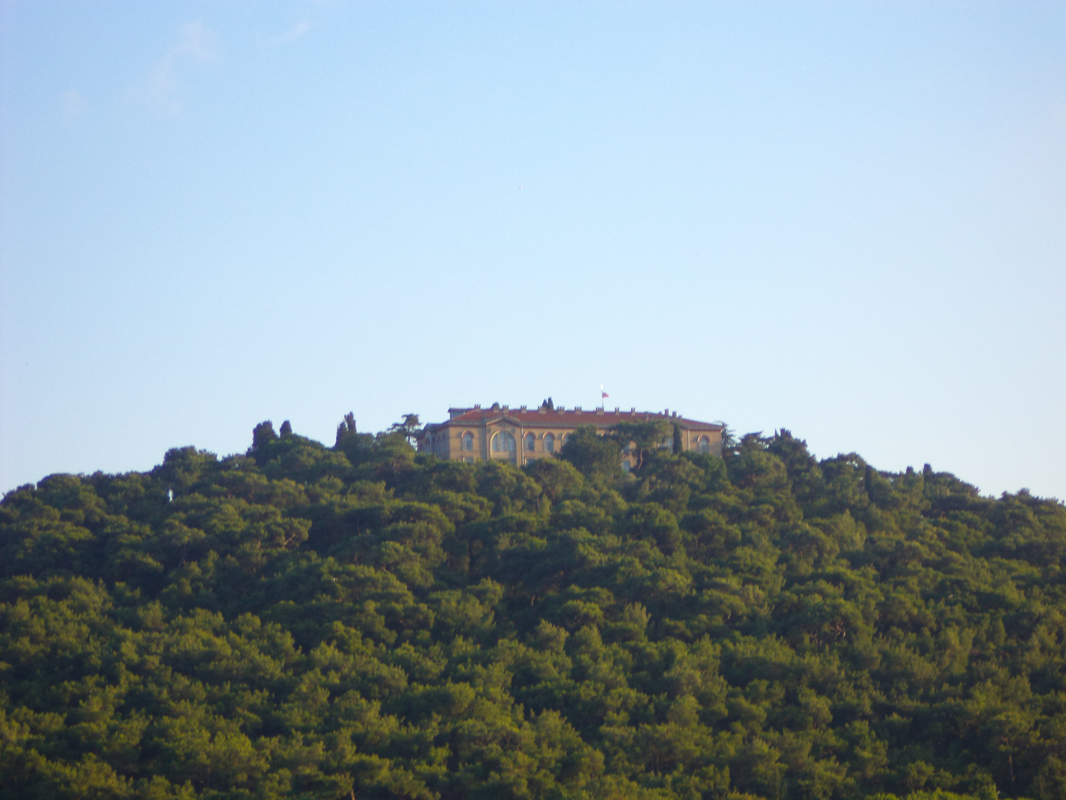 Η Ἱερὰ Θεολογικὴ Σχολὴ τῆς Χάλκης στην κορυφή του λόφου της Ελπίδας